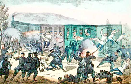 Agguato operato dai Cacciatori delle Alpi a Seriate, giugno 1859, litografia, ridotto